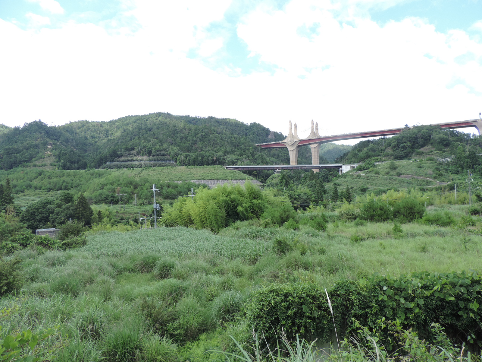 大戸川ダムの水没予定地となる滋賀県大津市上田上大鳥居町（2019年7月撮影）。前方に滋賀県道16号大津信楽線の付け替え道路と新名神高速道路の近江大鳥橋が見える。